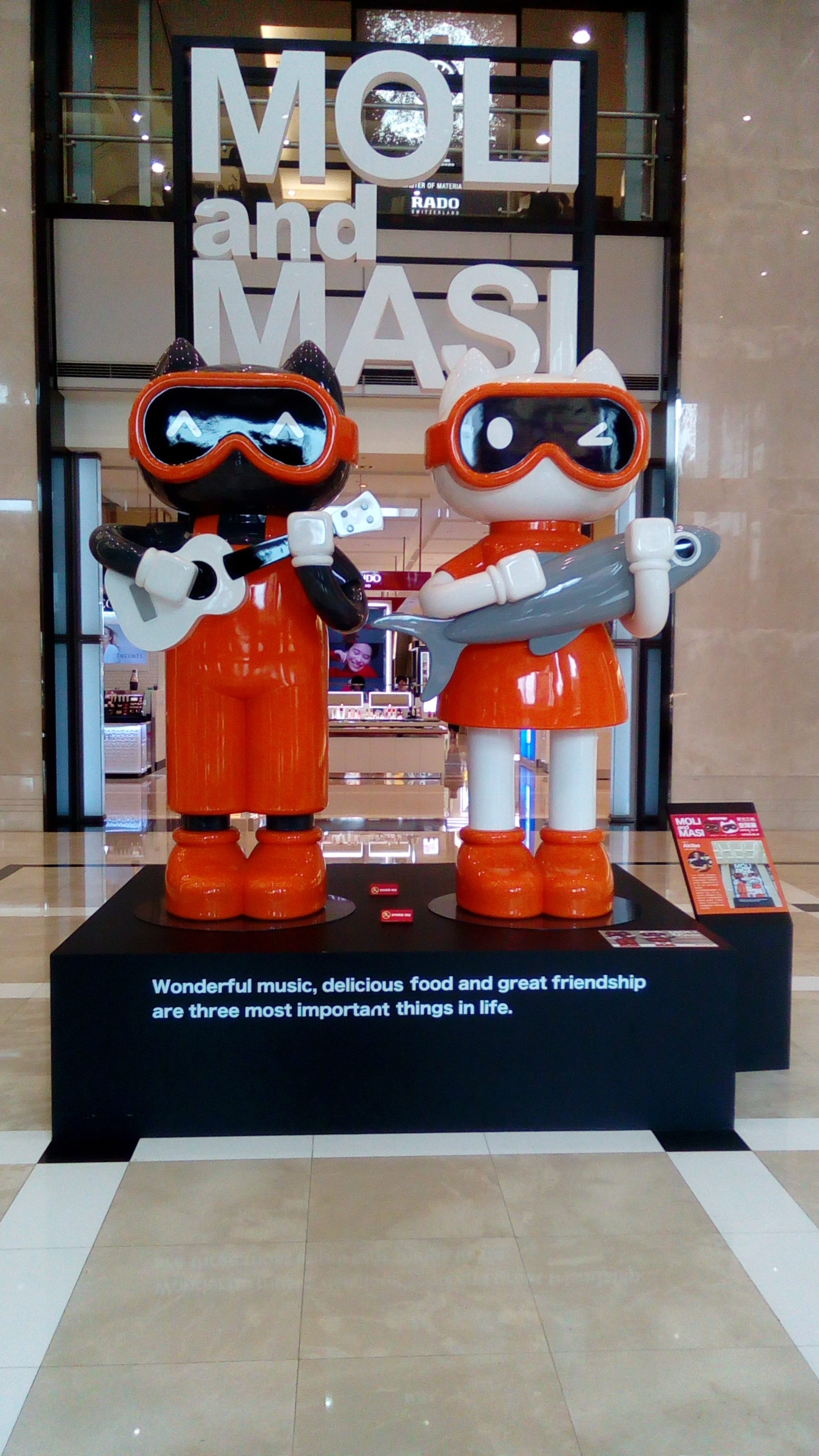 同上